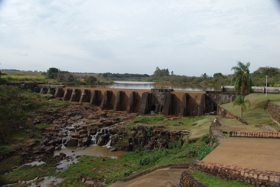 Imagem da Usina de Lobo (UH), município de Itatinga, estado de São Paulo, Brasil.